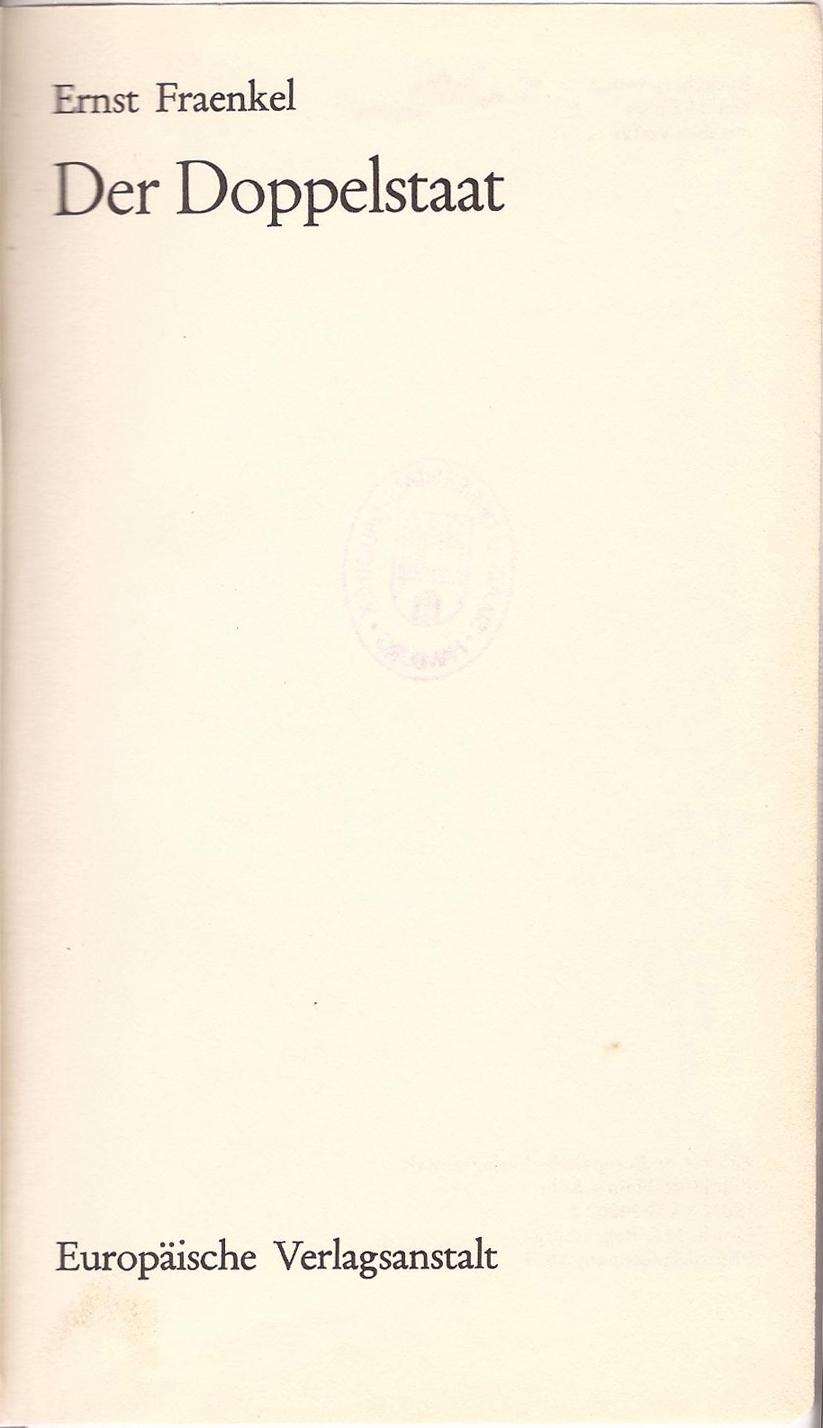 Titel: Der Doppelstaat. Recht und Justiz im „Dritten Reich“. Rückübers. aus dem Englischen von Manuela Schöps in Zusammenarbeit mit dem Verfasser, Europäische Verlags-Anstalt, Frankfurt am Main 1974, ISBN 3-434-20062-2.